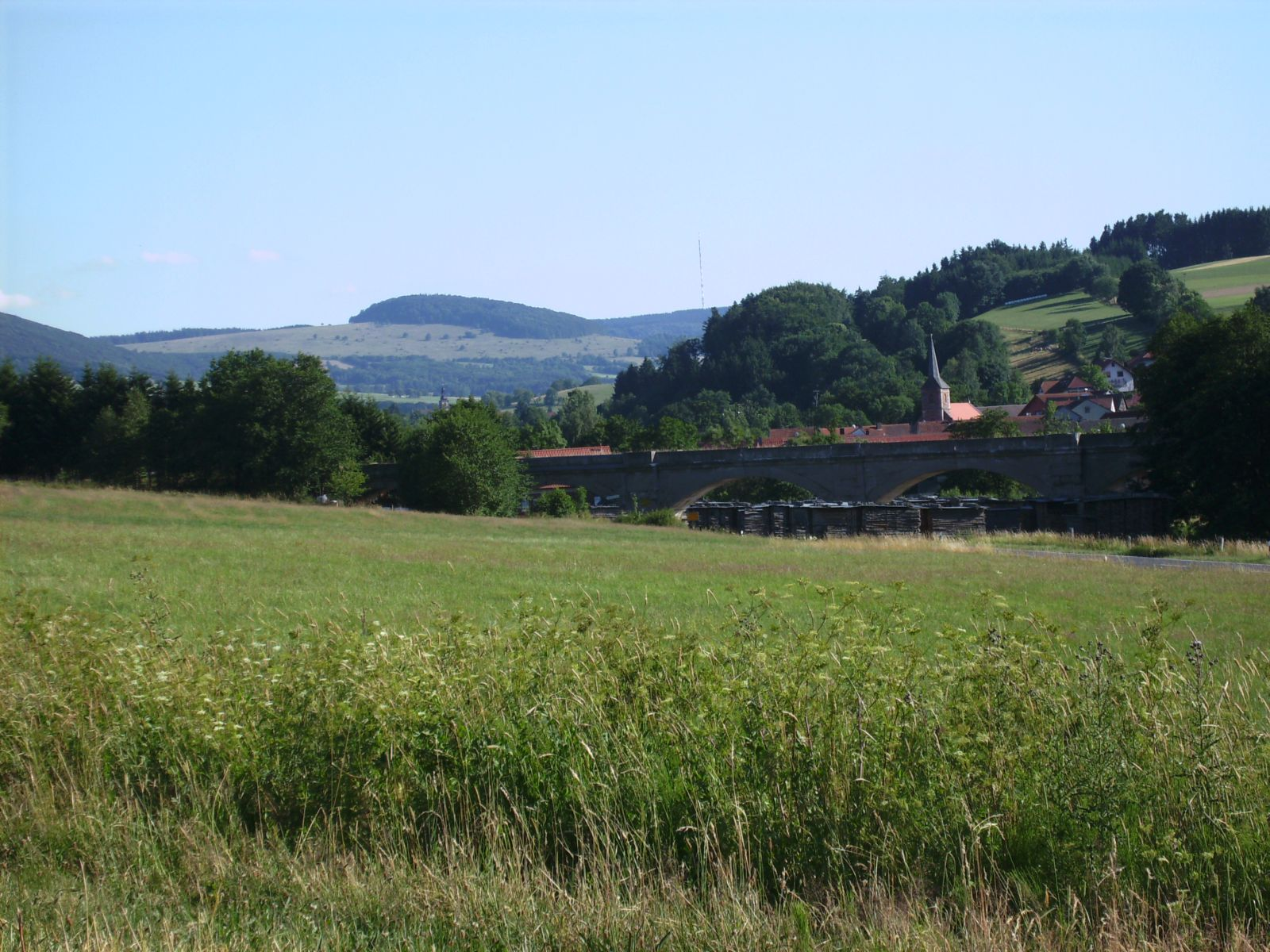 Eisenbahnviadukt am Ortseingang von Thaiden in der Rhön mit der darunterliegenden B278